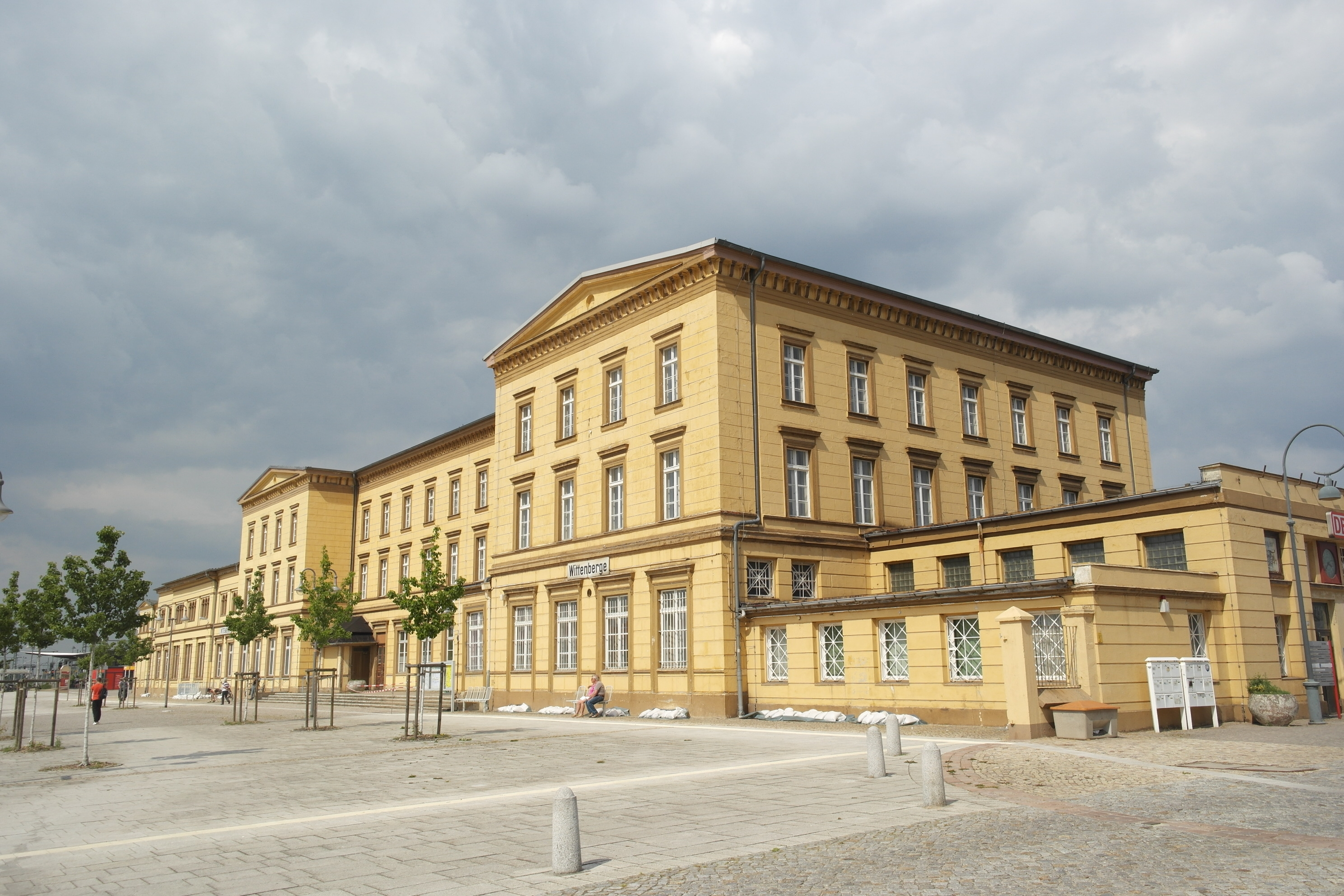 Denkmalgeschütztes Empfangsgebäude am Bahnhof Witttenberge.